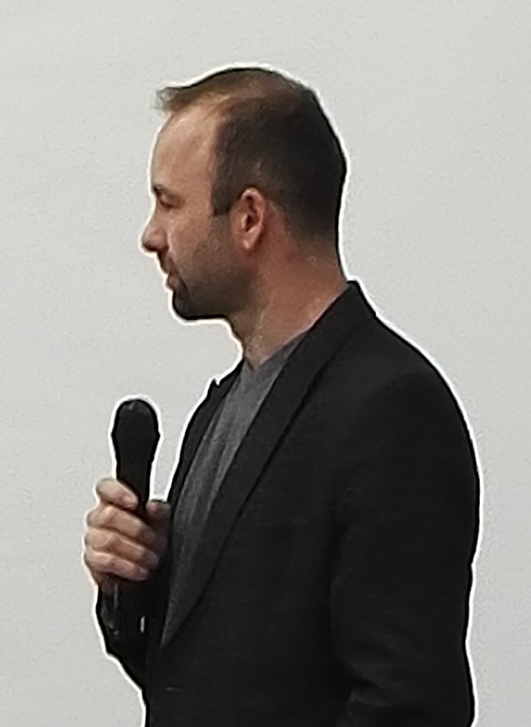 Aleš Valenta v roce 2017